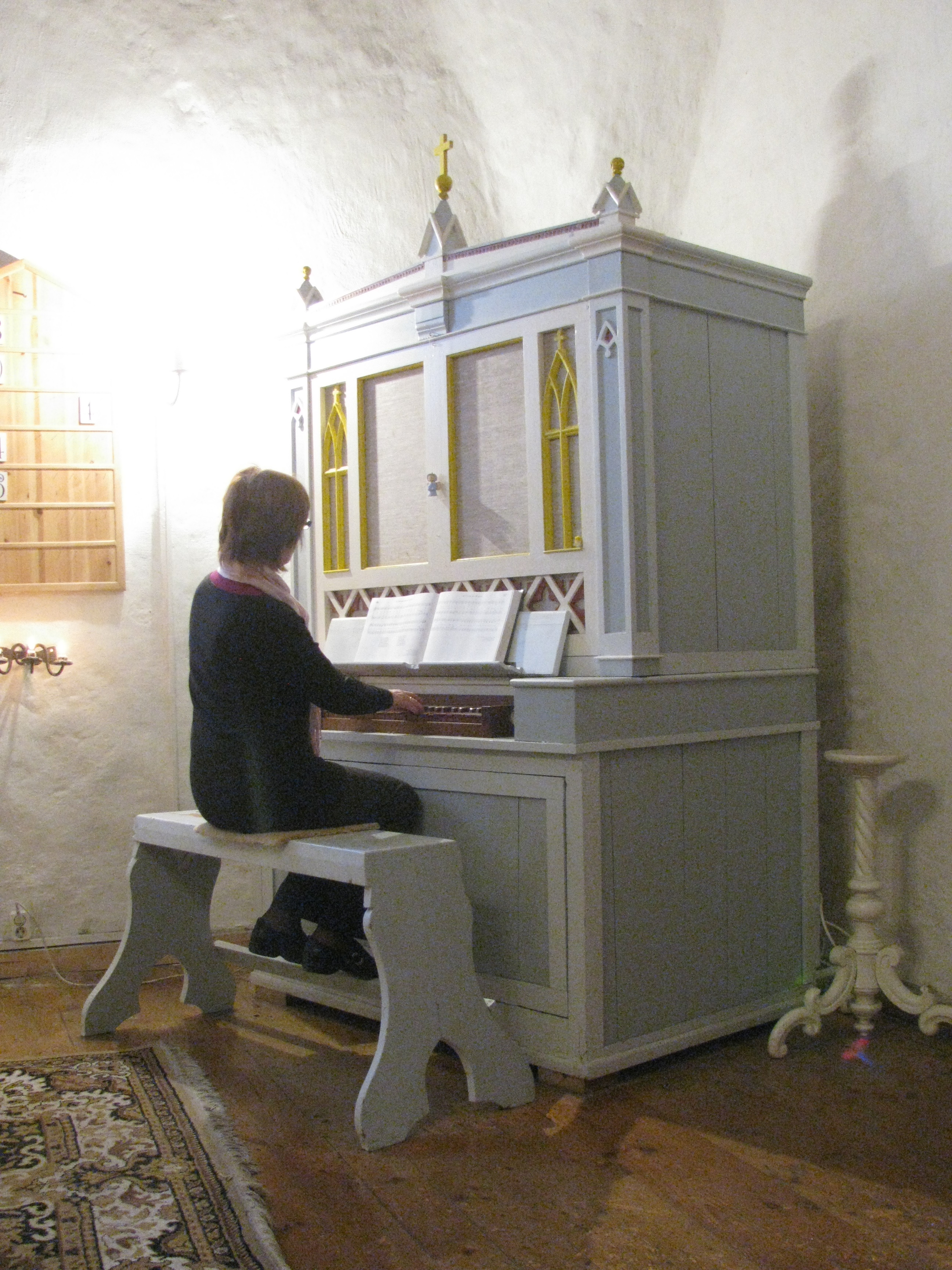 Orel Vigala kiriku käärkambris